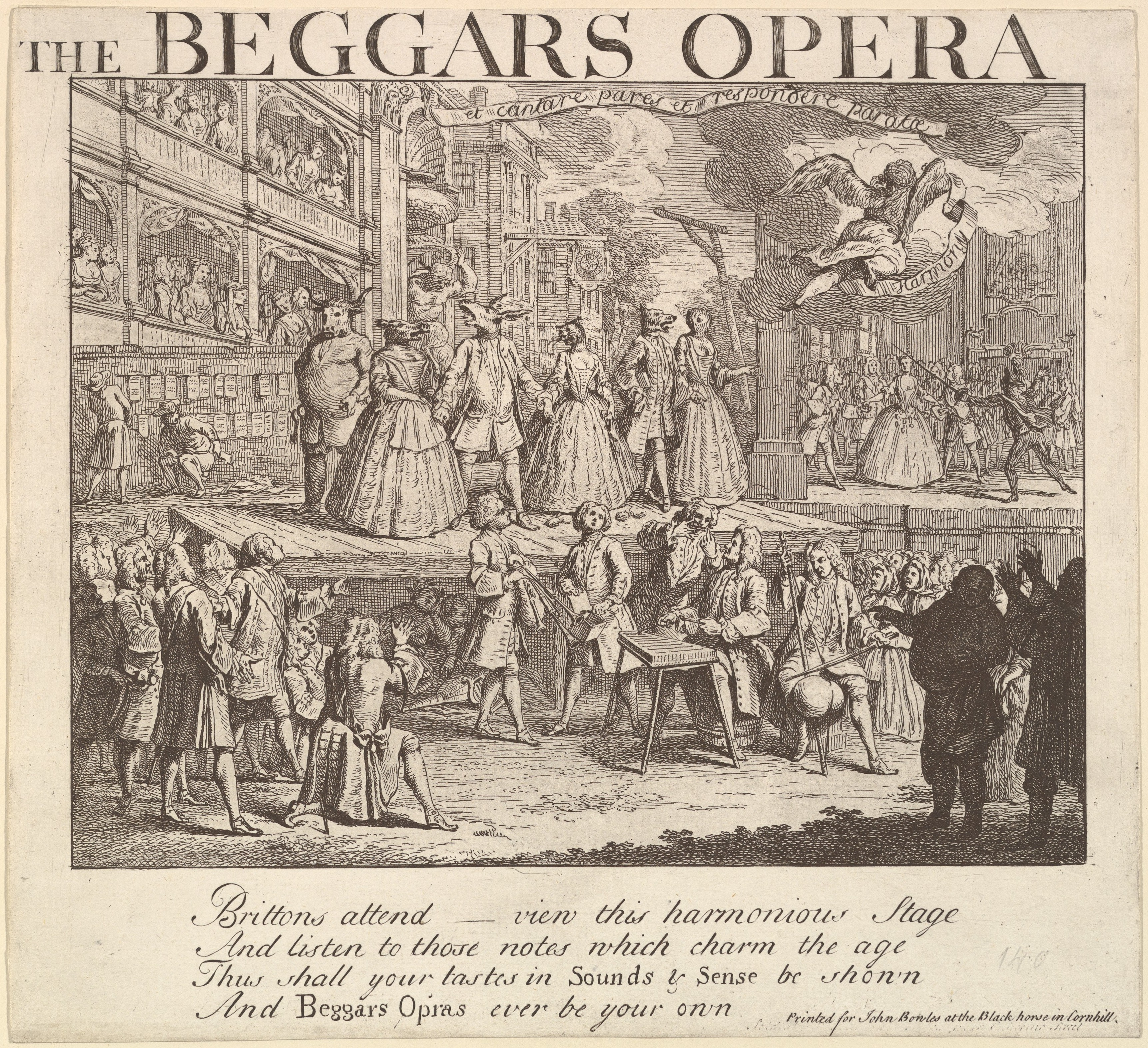 Print